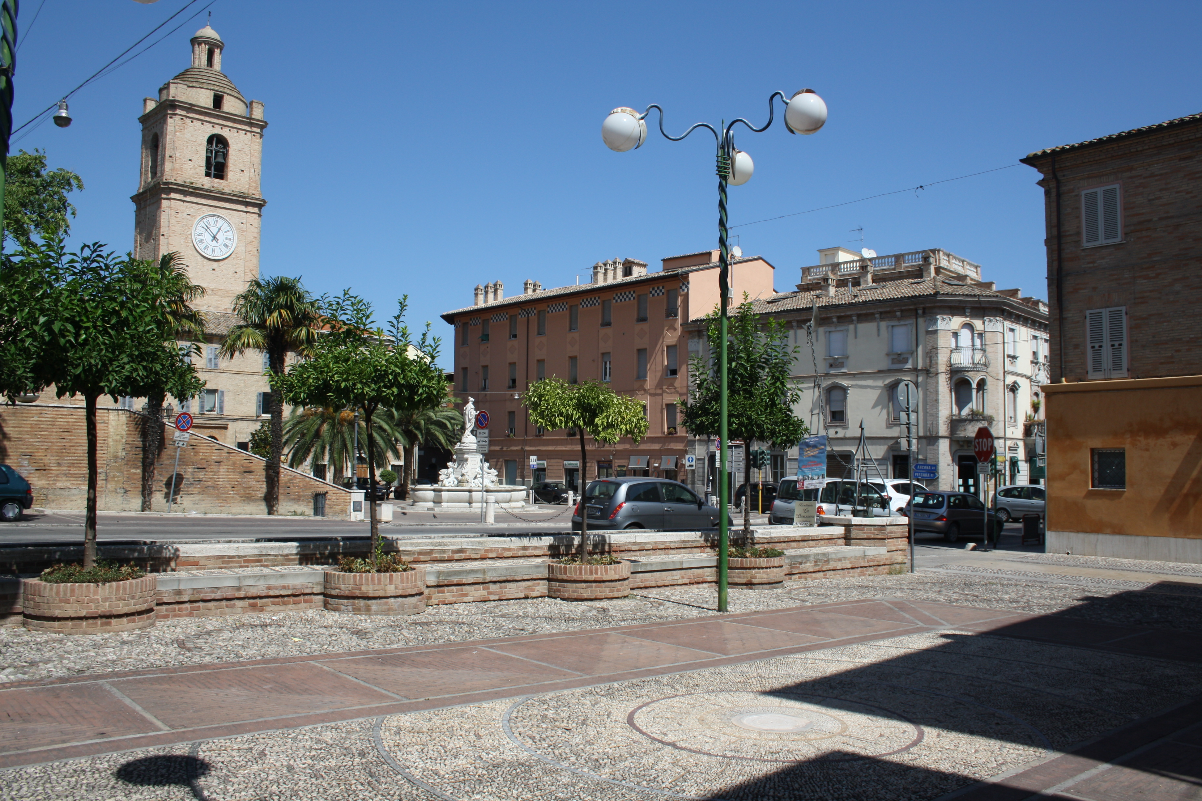 Vista da Largo del Teatro verso Piazza San Giorgio e Corso Garibaldi